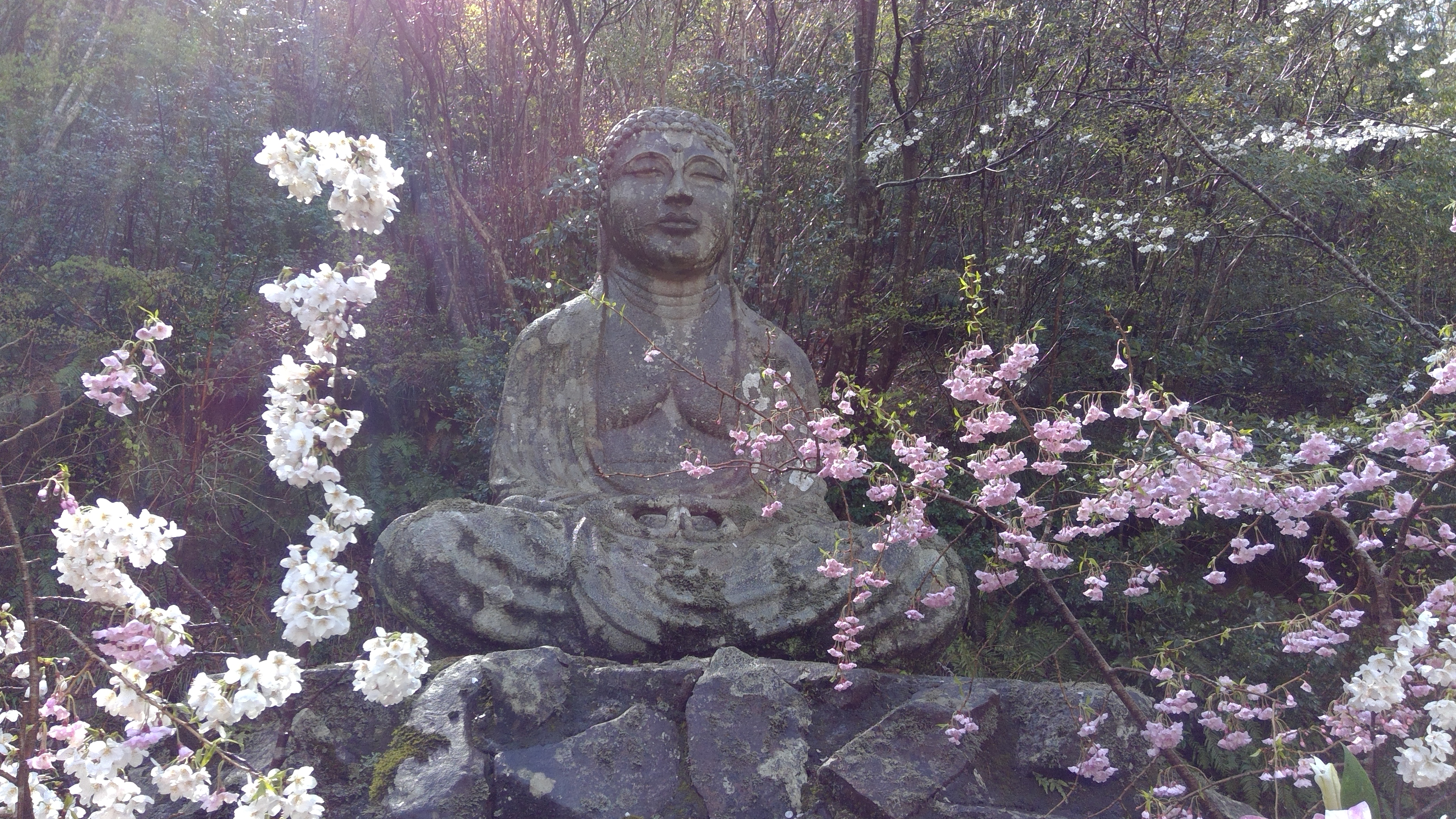 日本遺産「丹後ちりめん回廊」構成文化財のひとつ、丹後大仏の花祭り当日